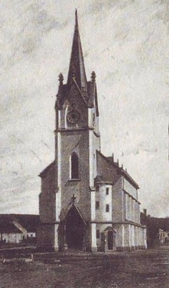 Kostel svatého Floriána v Brně-Černovicích